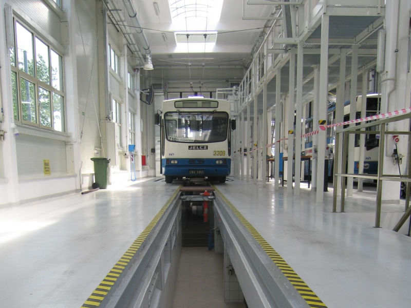 Trolejbus Jelcz 120ME (#3308) z 1996 roku w warsztacie PKT.